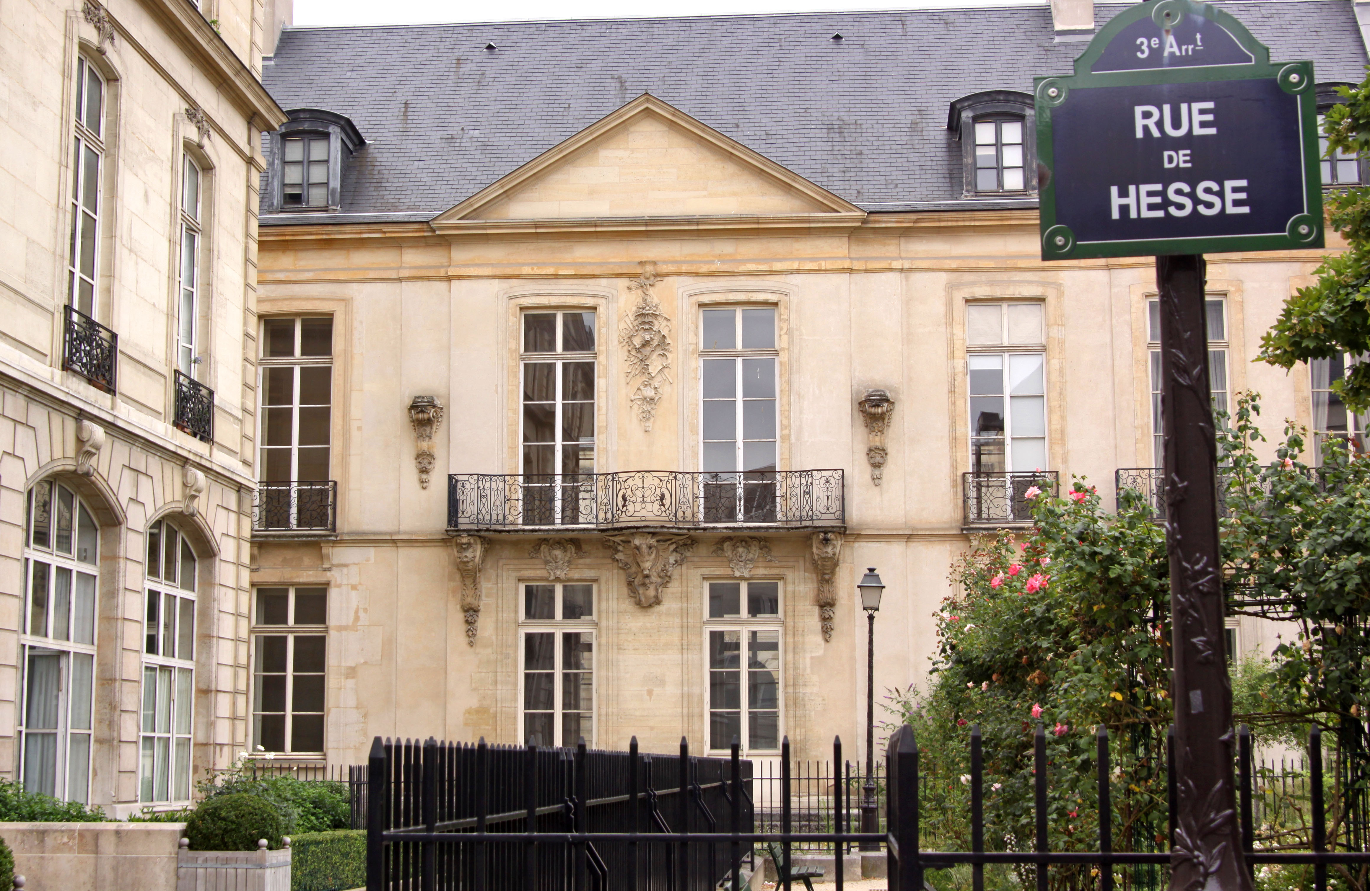 L'Hôtel du Grand Veneur rue de Hesse dans le Marais à Paris